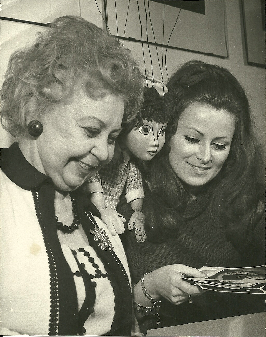 Střídání interpretek (s Helenou Štáchovou)